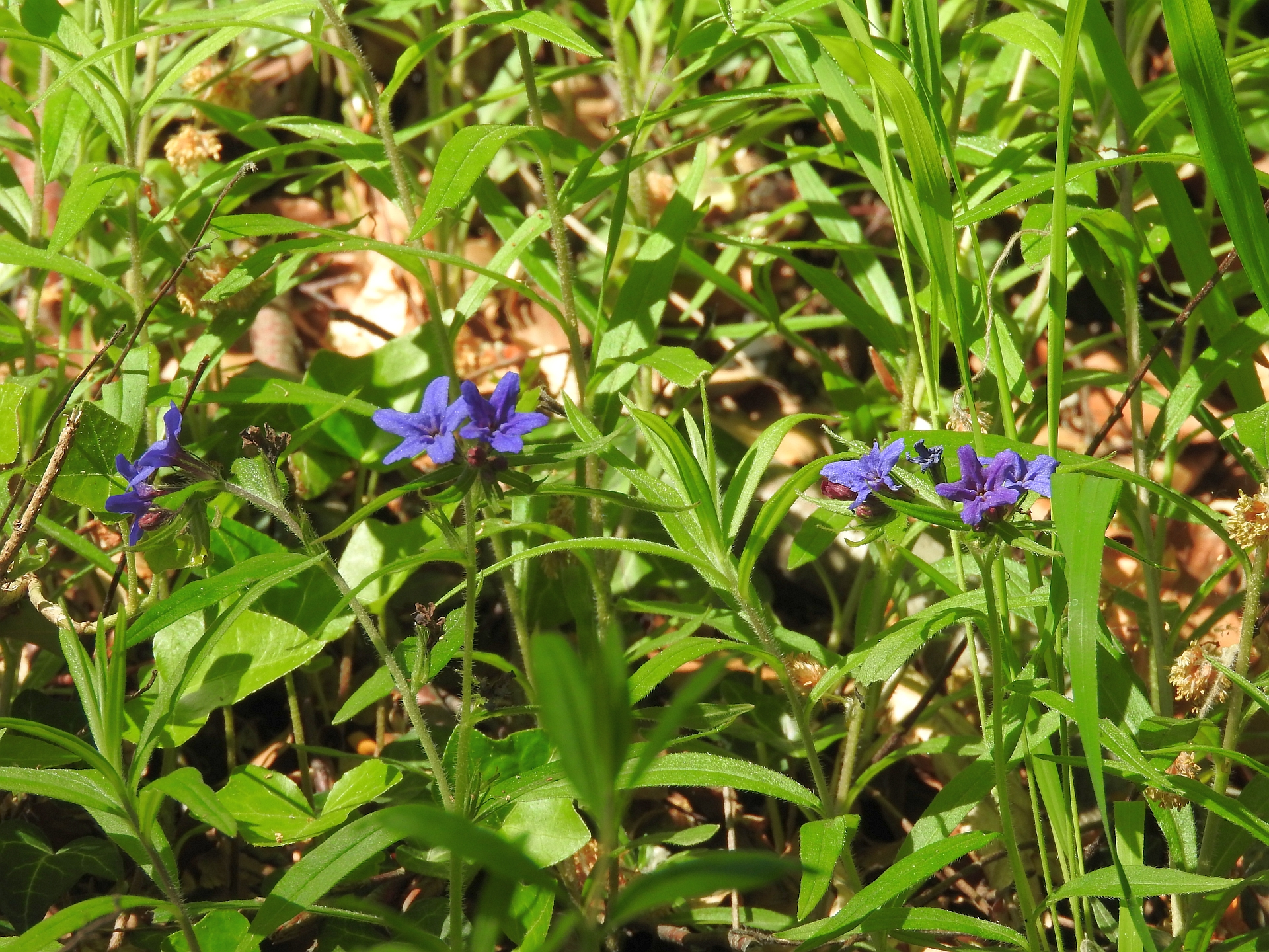 Blauroter Steinsame (Buglossoides purpurocaerulea),Weingarten (Baden), Ungeheuerklamm, 05.05.2016